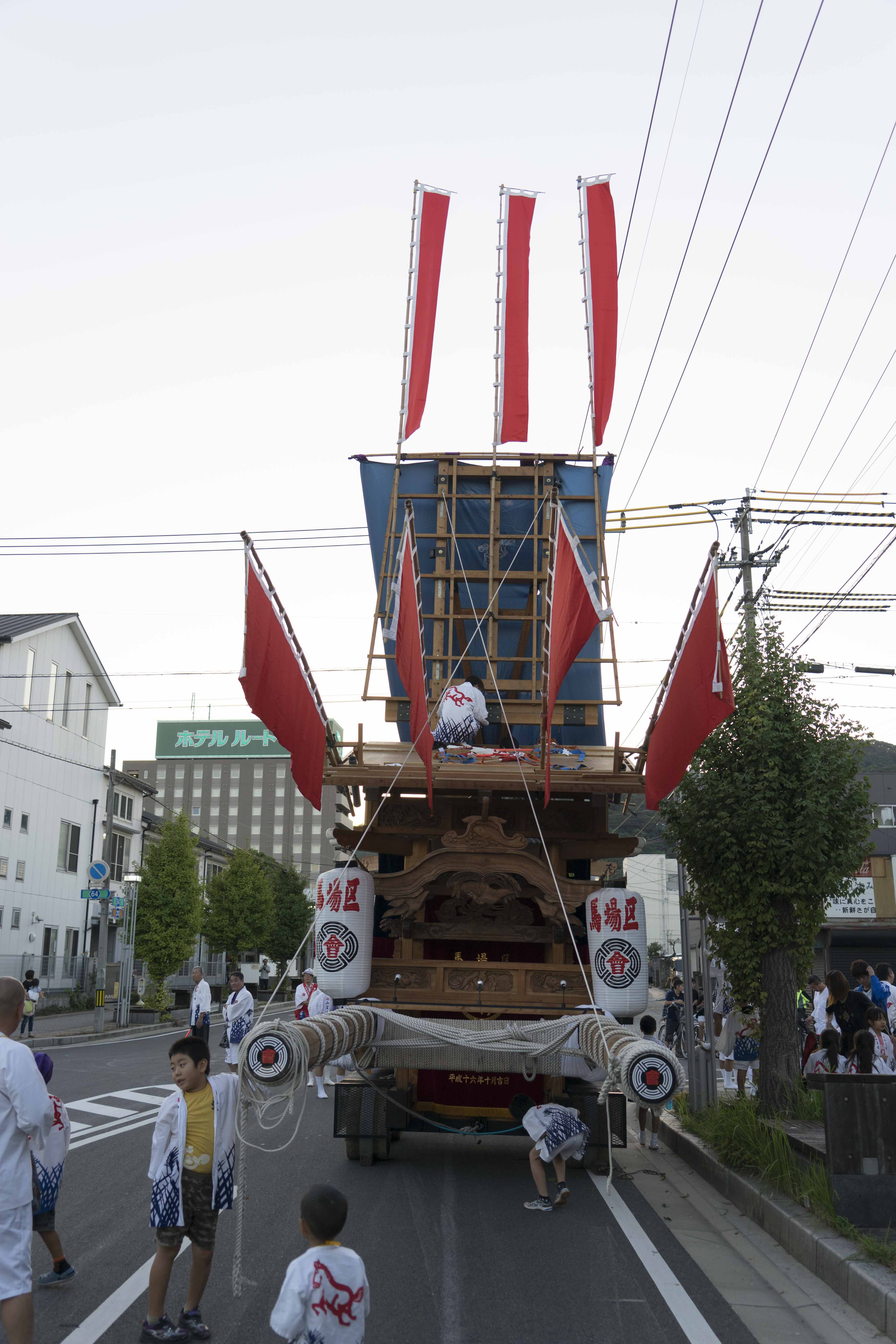 苅田山笠 馬場区 幟山